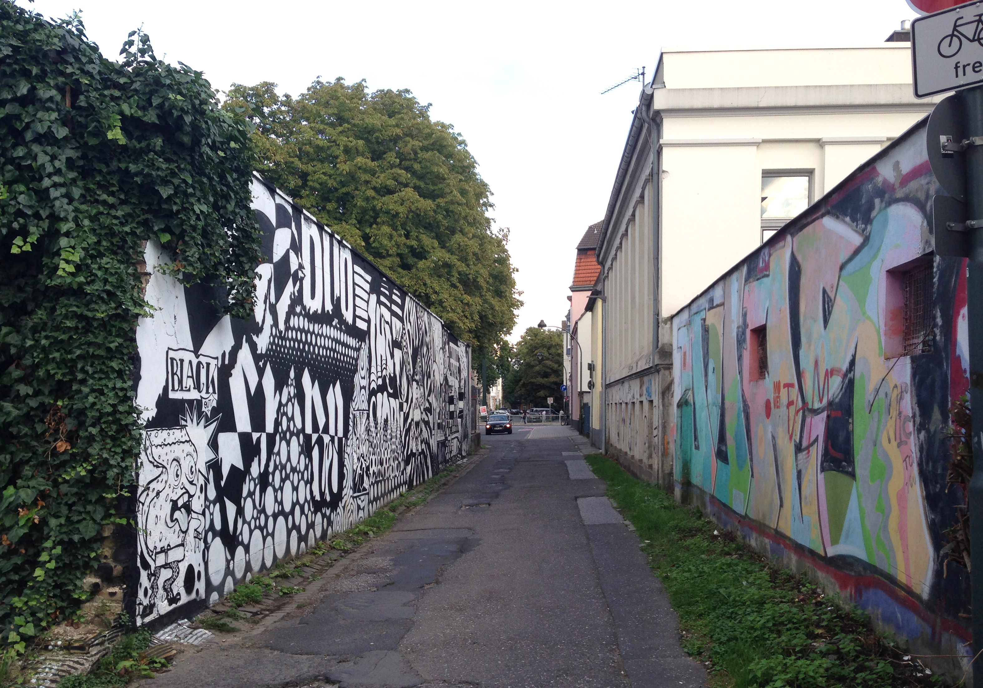 Street art, Greifweg, Düsseldorf-Oberkassel